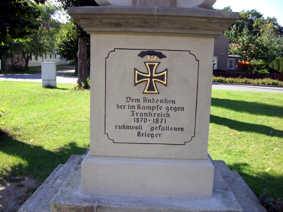 Stolzenhain, Denkmal für die Opfer des Deutsch-Französischen Krieges 1870/71